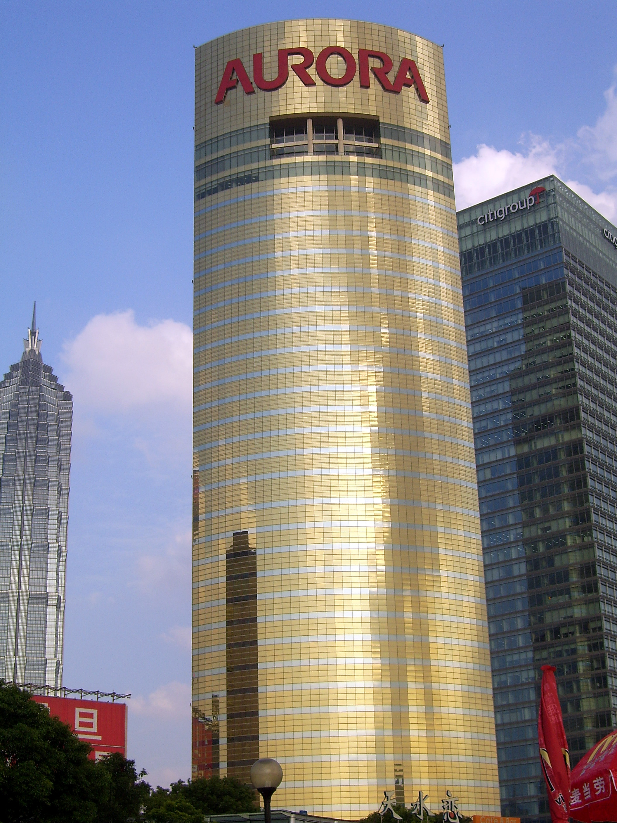 震旦國際大樓，位於上海市浦東新區富城路99號。